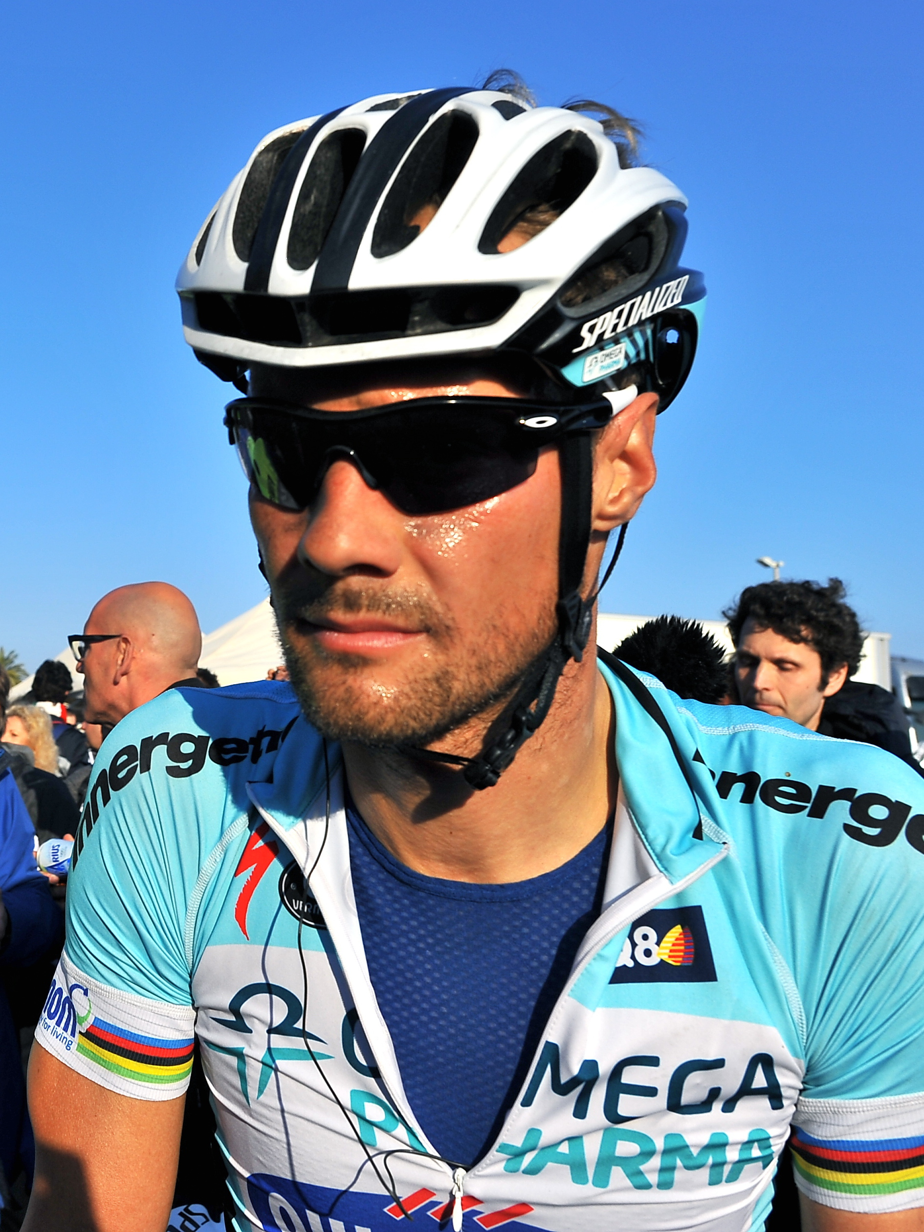 Le 103e Milan-San Remo (2012)